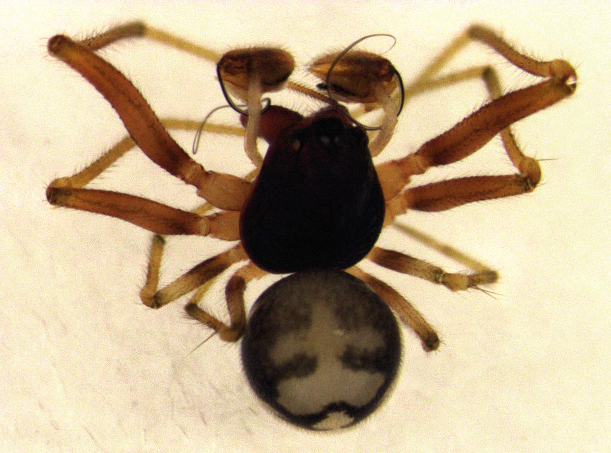 adult male Hanea paturau (carapace length about 1 mm)